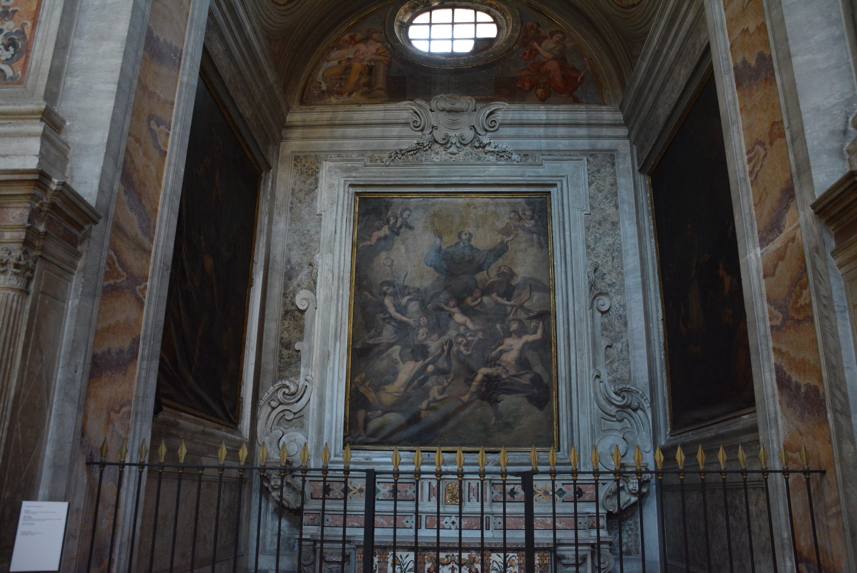 Cappella De Sanctis-Benincasa nella chiesa di Santa Maria la Nova a Napoli